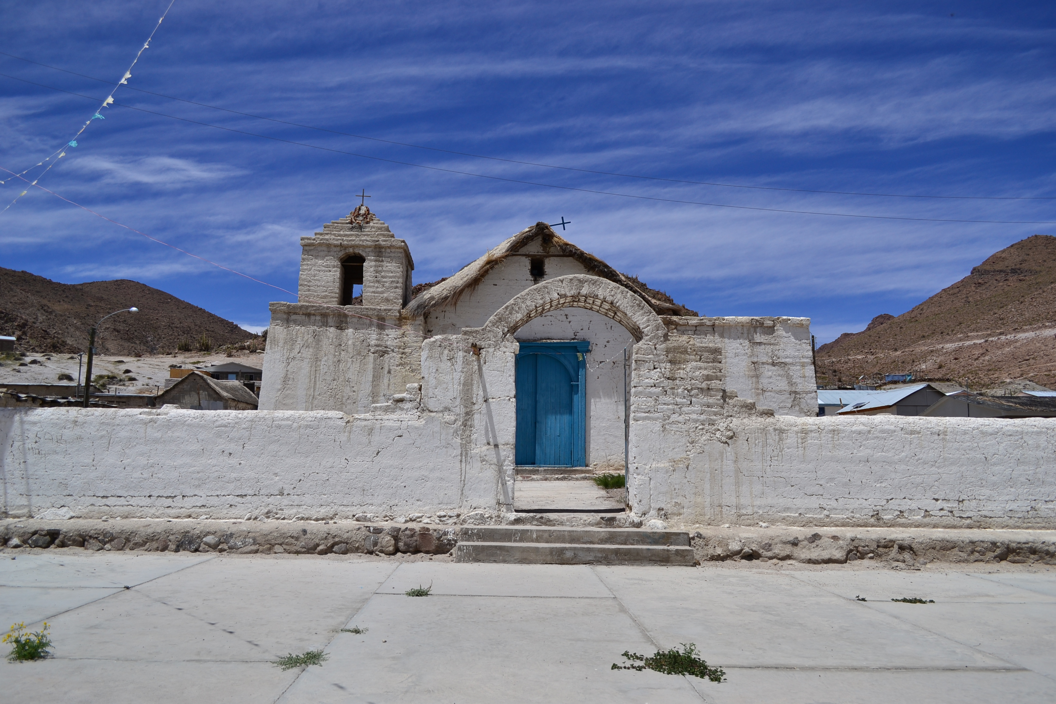 La bella iglesia del pueblo de Nama, en la comuna de Camiña, región de Tarapacá, Chile. This is a photo of a national monument in Chile: 2057